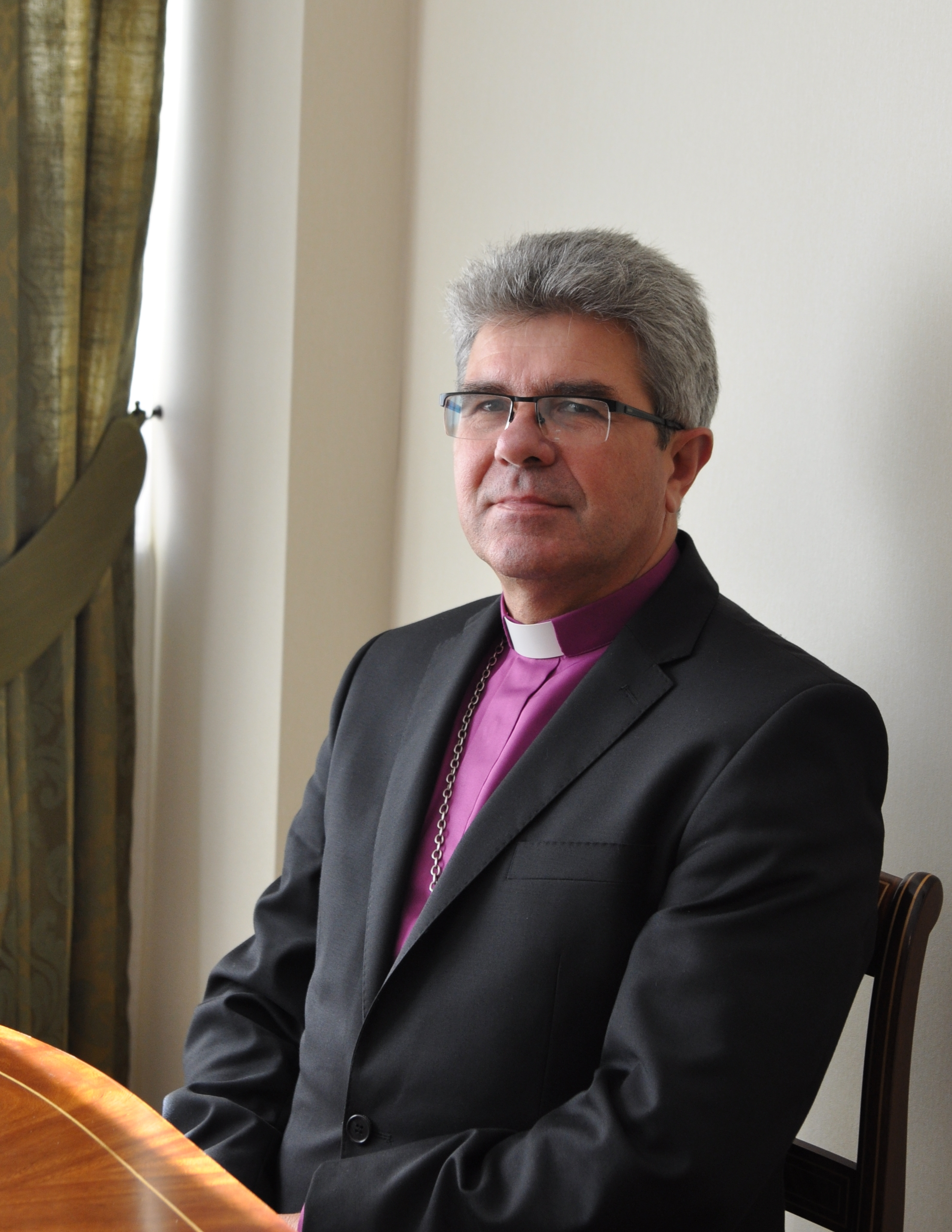 ks. bp dr Marian Niemiec. Proboszcz parafii ewangelickiej w Katowicach, biskup diecezji katowickiej Kościoła Ewangelicko-Augsburskiego w Polsce.